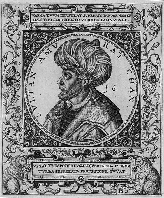 Grafik aus dem Klebeband Nr. 1 der Fürstlich Waldeckschen Hofbibliothek Arolsen Illustration aus: Georg Greblinger: Wahre Abbildungen der Türckischen Kayser vnd Persischen Fürsten / so wol auch anderer Helden und Heldinnen von dem Osman / biß auf den andern Mahomet. Johann Ammon, Frankfurt 1648 Motiv: "Sultan Amurat Chan"